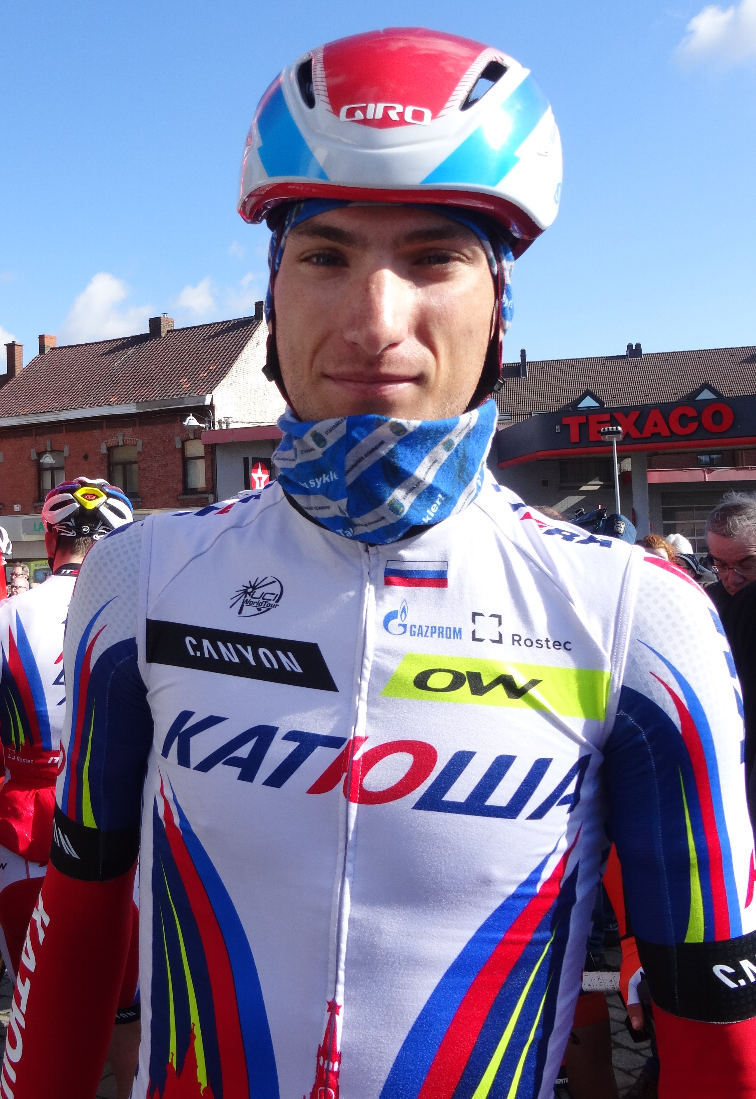 Reportage réalisé le mercredi 4 mars à l'occasion du départ du Samyn des Dames 2015 et du Samyn 2015 à Quaregnon, Belgique.